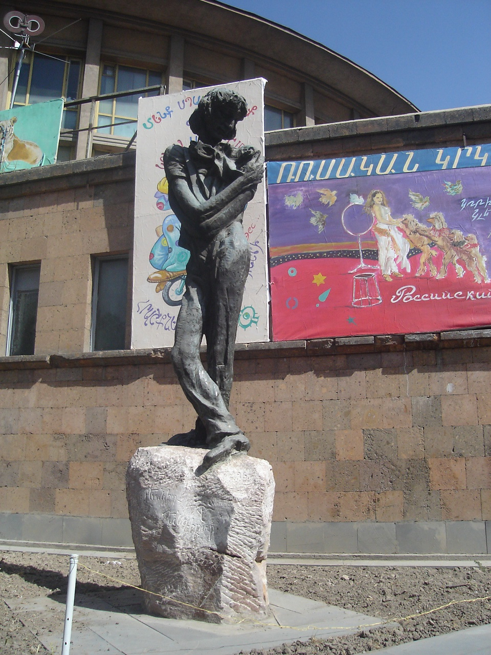 Լեոնիդ Ենգիբարյանի հուշարձան, Երևան, 1998, քանդ. Լևոն Թոքմաջյան